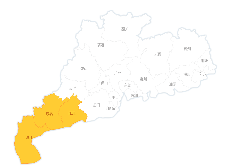 中文（中国大陆）: 粤西地理位置